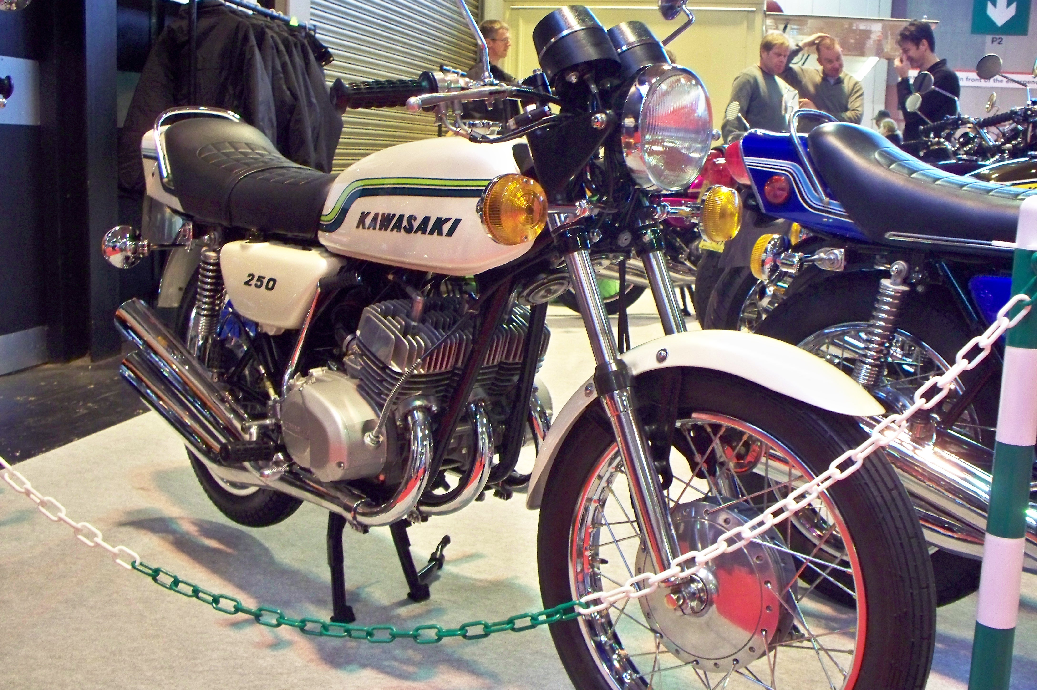 Kawasaki 250 S1 del 1972